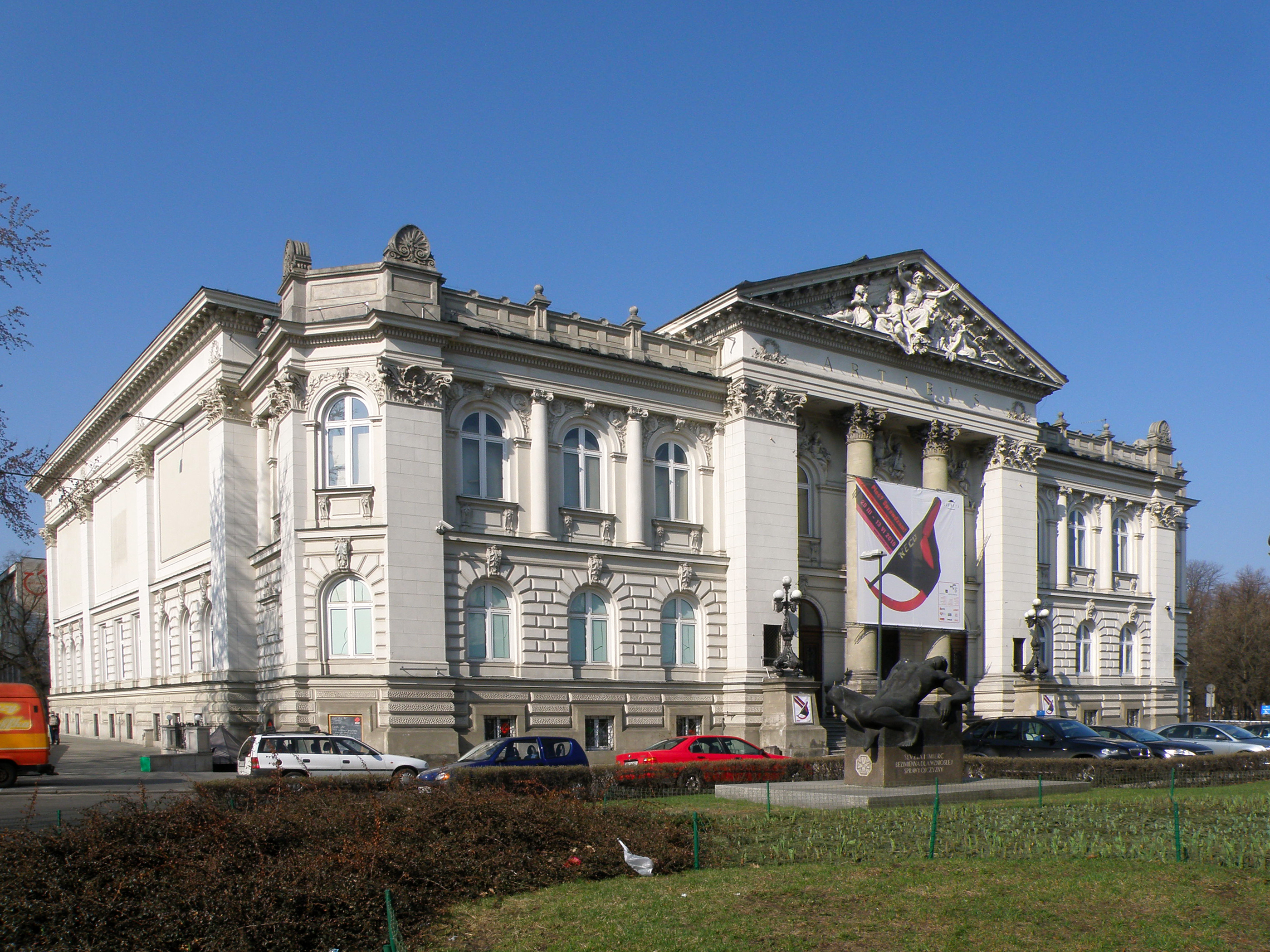 Zachęta Narodowa Galeria Sztuki